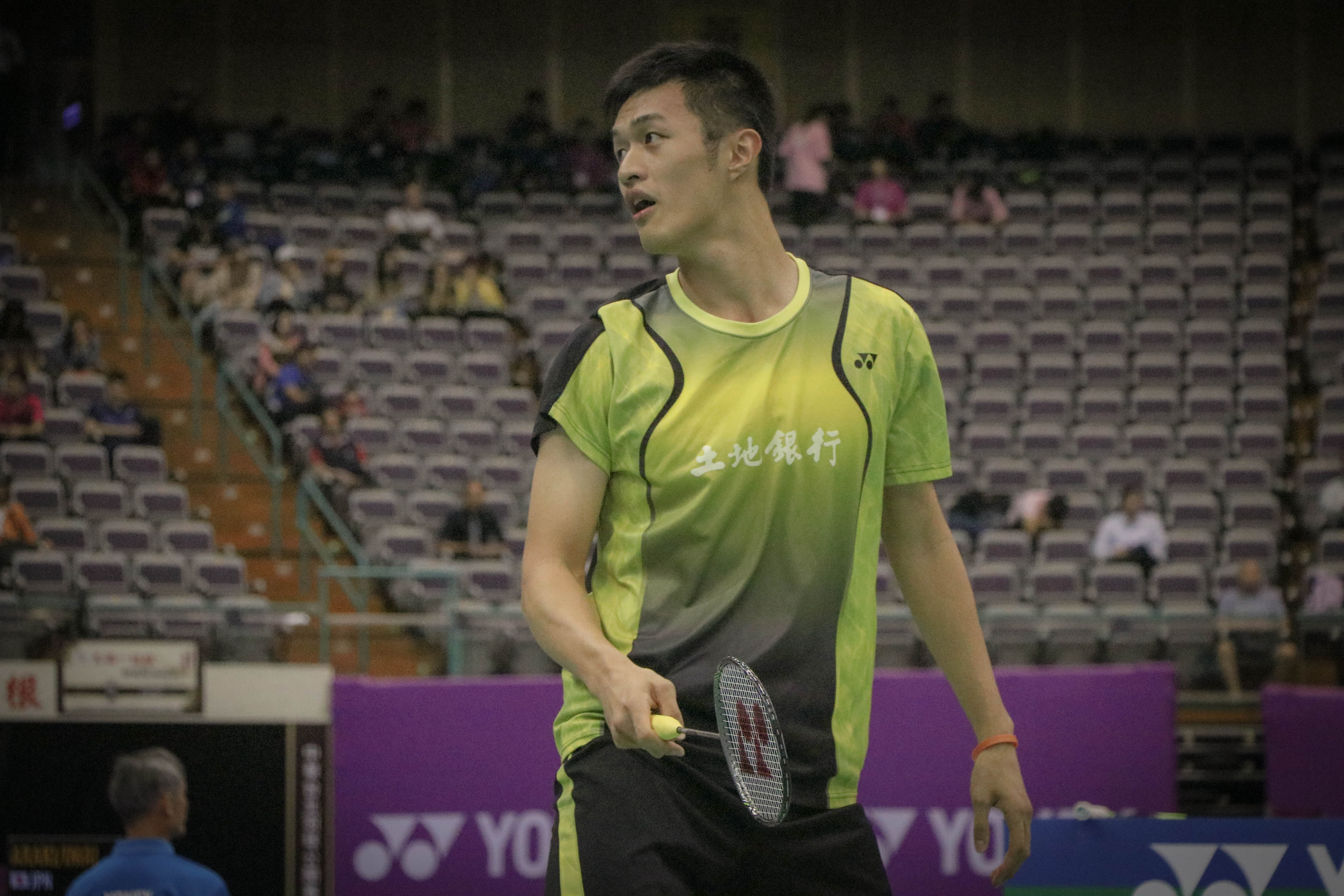 2018 台北OPEN 10/03